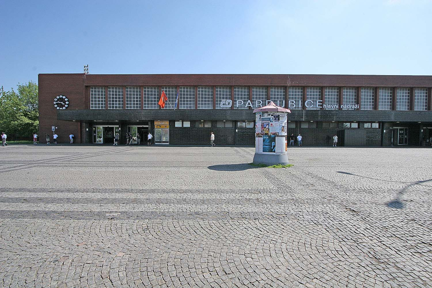 Budova hlavího nádraží v Pardubicích